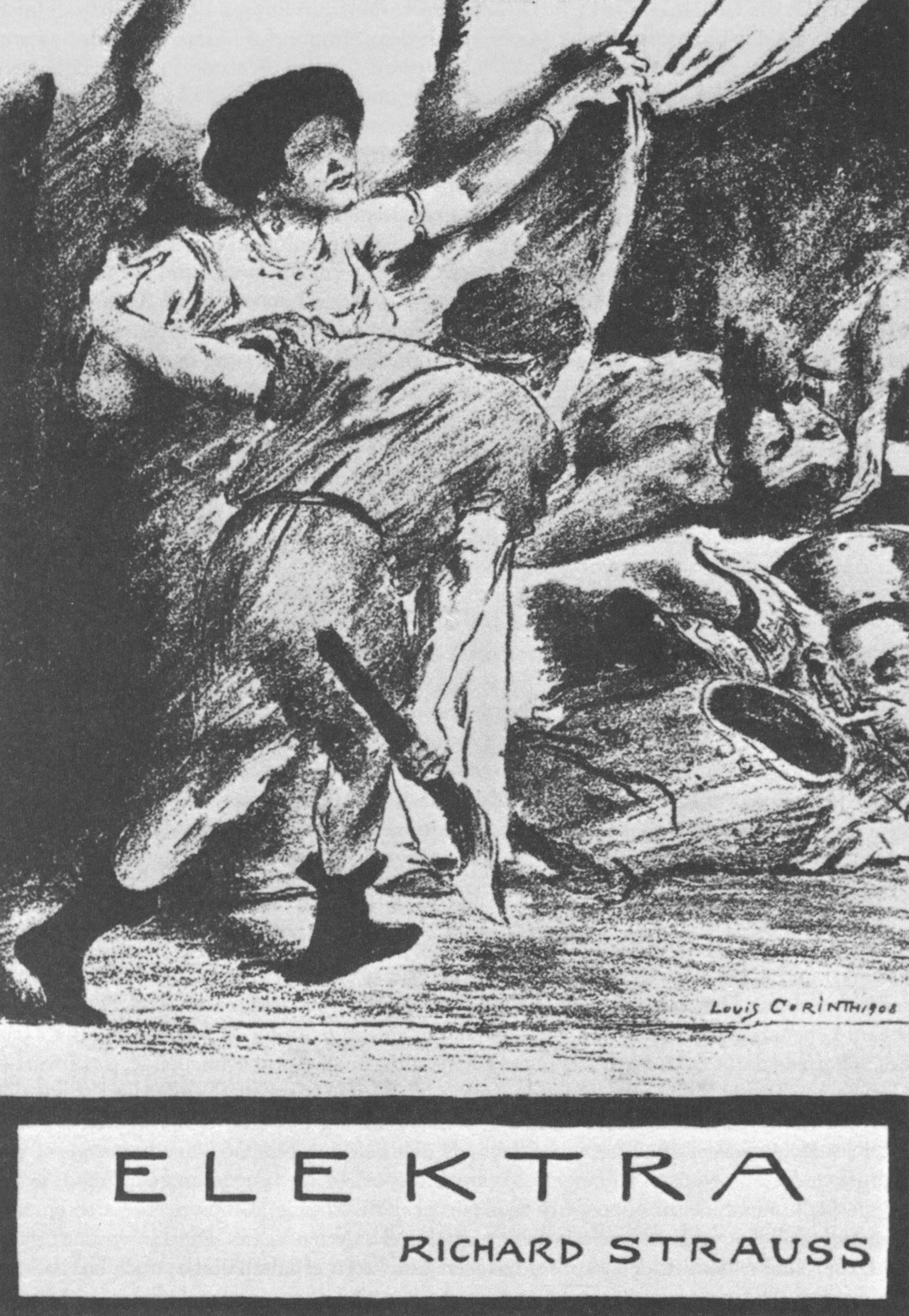 Richard Strauss - Elektra - titlepage of the libretto - drawing by Lovis Corinth - 1909